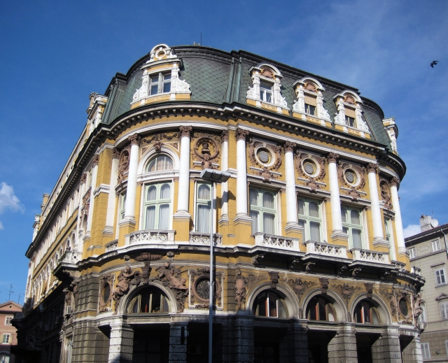 Palača Modello, danas lokacija središnjeg odjela Gradske knjižnice Rijeka